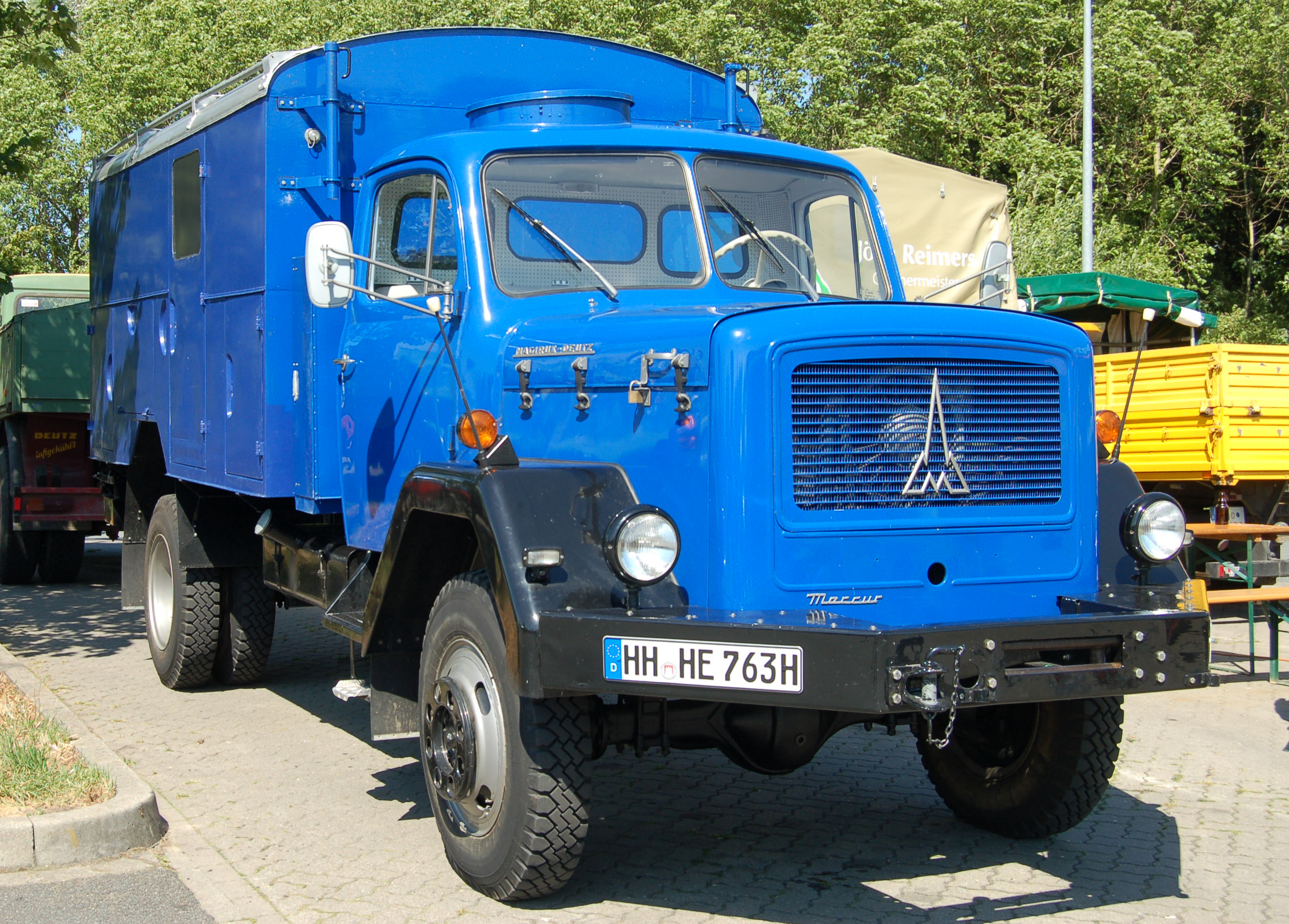 Magirus Deutz Mercur